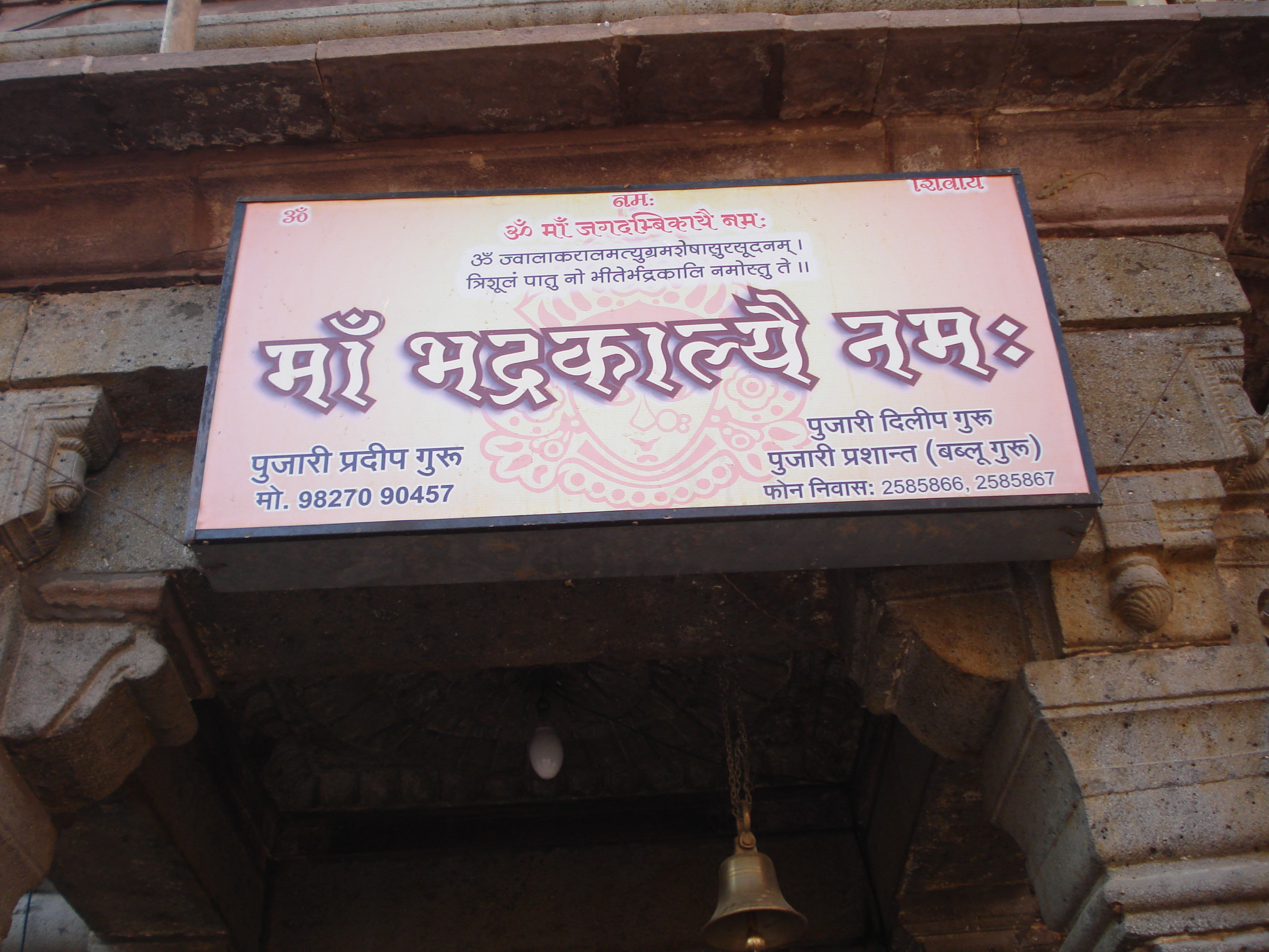 Bhadrakali Temple at Ujjain, Madhya Pradesh